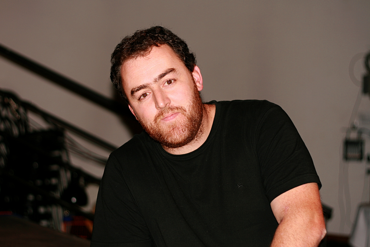 Jan Koch bei einem Besuch der Lesebühne Die Brauseboys